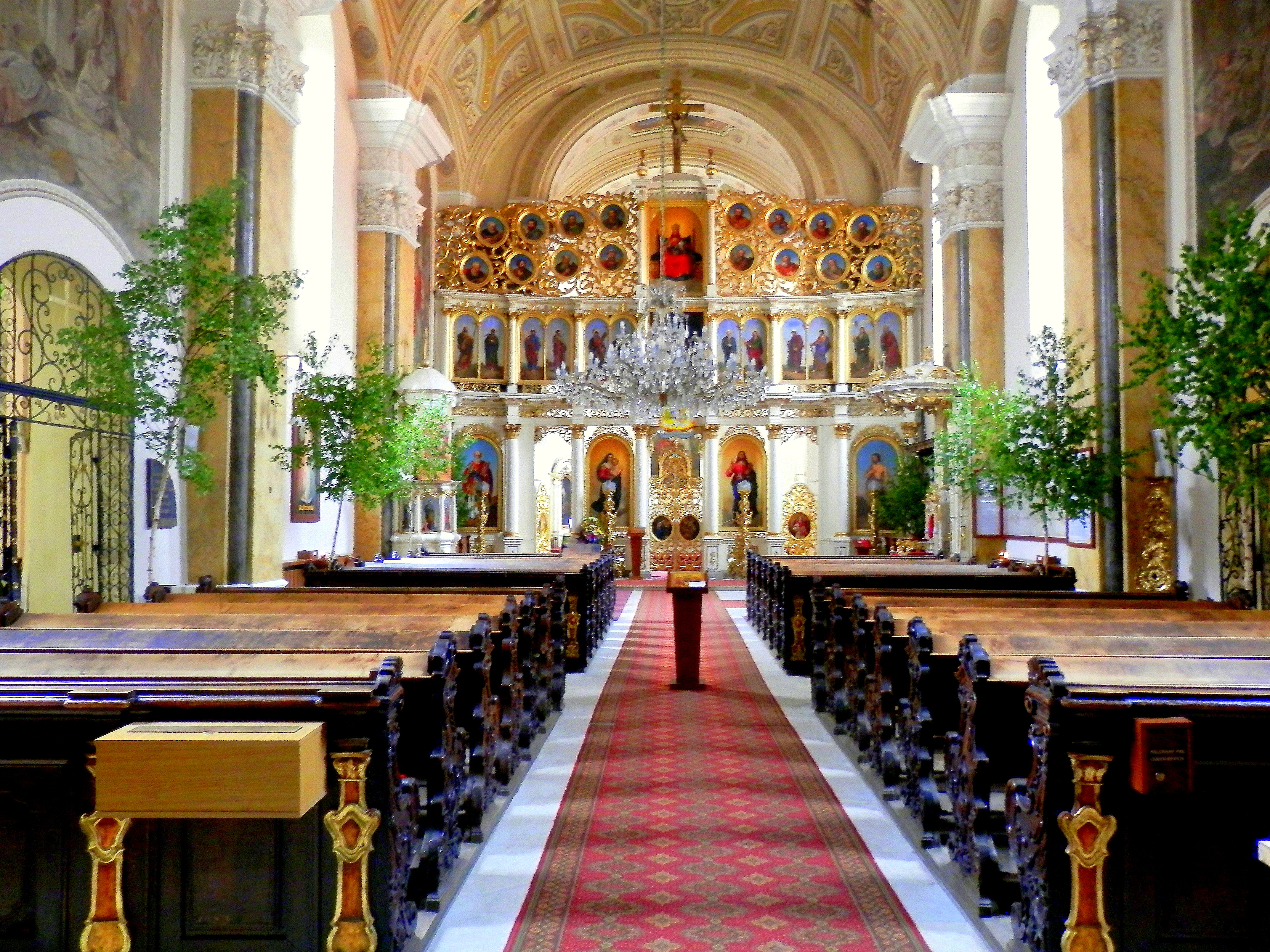 Interiér gréckokatolíckej katedrály svätého Jána Krstiteľa, na Hlavnej ulici, mesto Prešov.